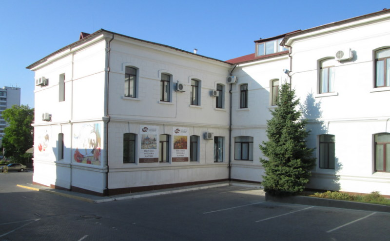 Колишній будинок в'язниці, зараз торгово-офісний центр "Новий бульвар". м. Севастополь, пл. Повсталих, 6